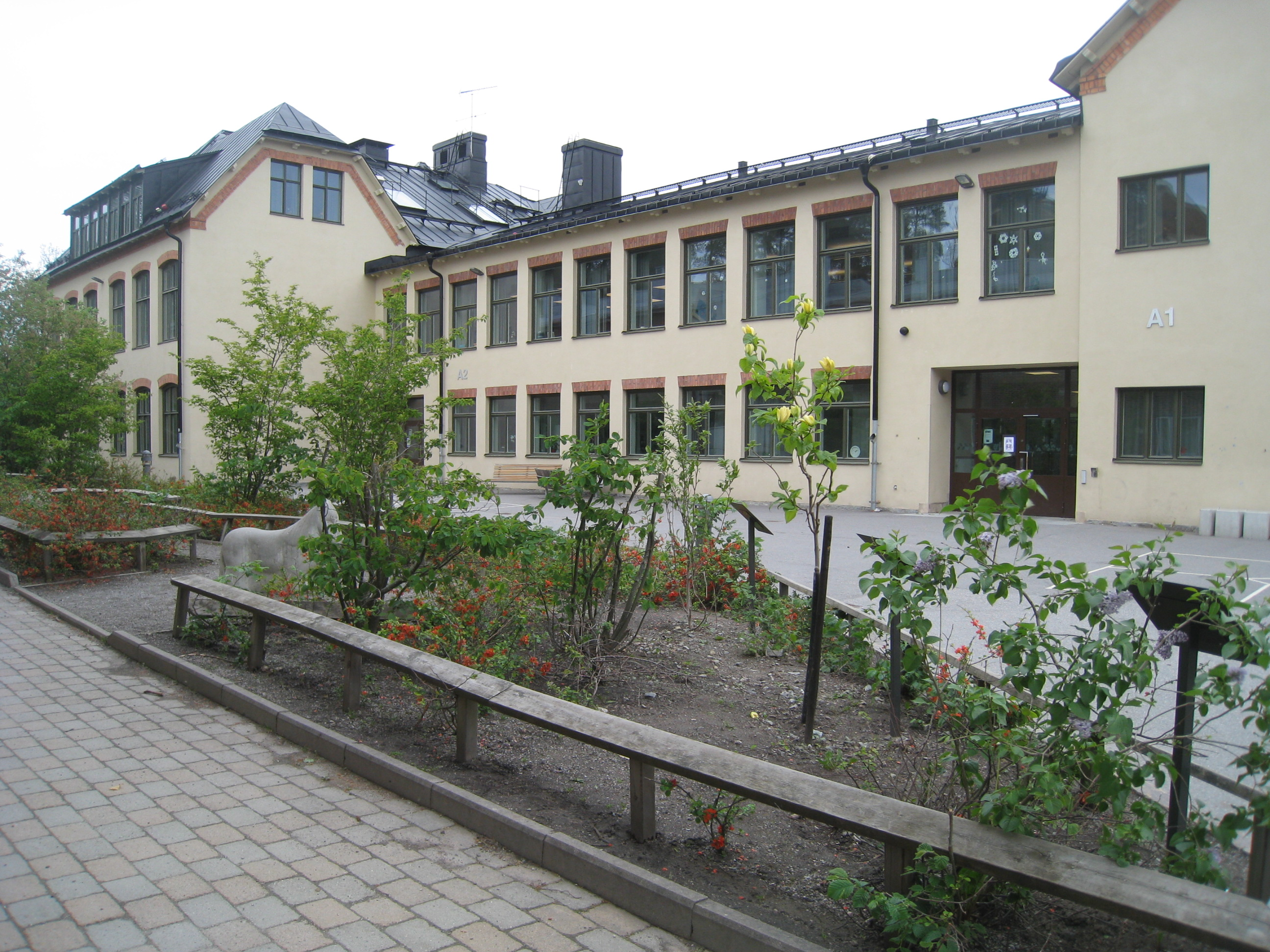 Alviksskolan, den äldsta byggnaden (A-huset), byggd 1898.